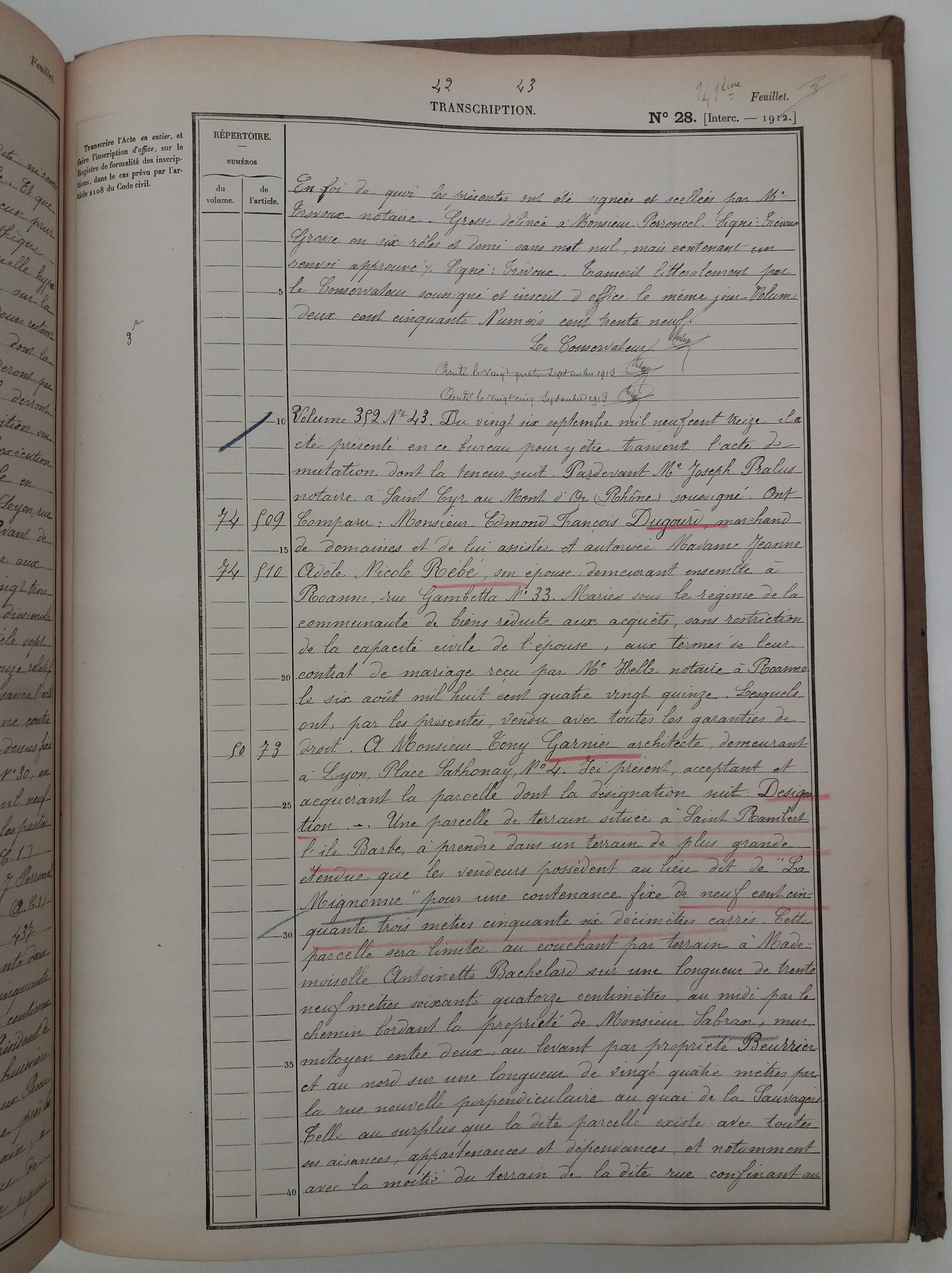 Le 26 septembre 1913, acte de mutation par devant Me Joseph Pralus notaire à Saint-Cyr-au-Mont-d'Or : Monsieur Edmond François Dugourd et son épouse ont vendu à Monsieur Tony Garnier, architecte, demeurant à Lyon, place Sathonay, au numéro 4, une parcelle de terrain à Saint-Rambert-l'Île-Barbe au lieu dit " La Mignonne ", pour une contenance fixe de 1953 mètres carrés, limitée à l'ouest par le terrain de Mademoiselle Bachelard, au sud par la propriété de Monsieur Sabran, à l'est par la propriété Beurrier et au nord par la rue nouvelle perpendiculaire au quai de la Sauvagère.